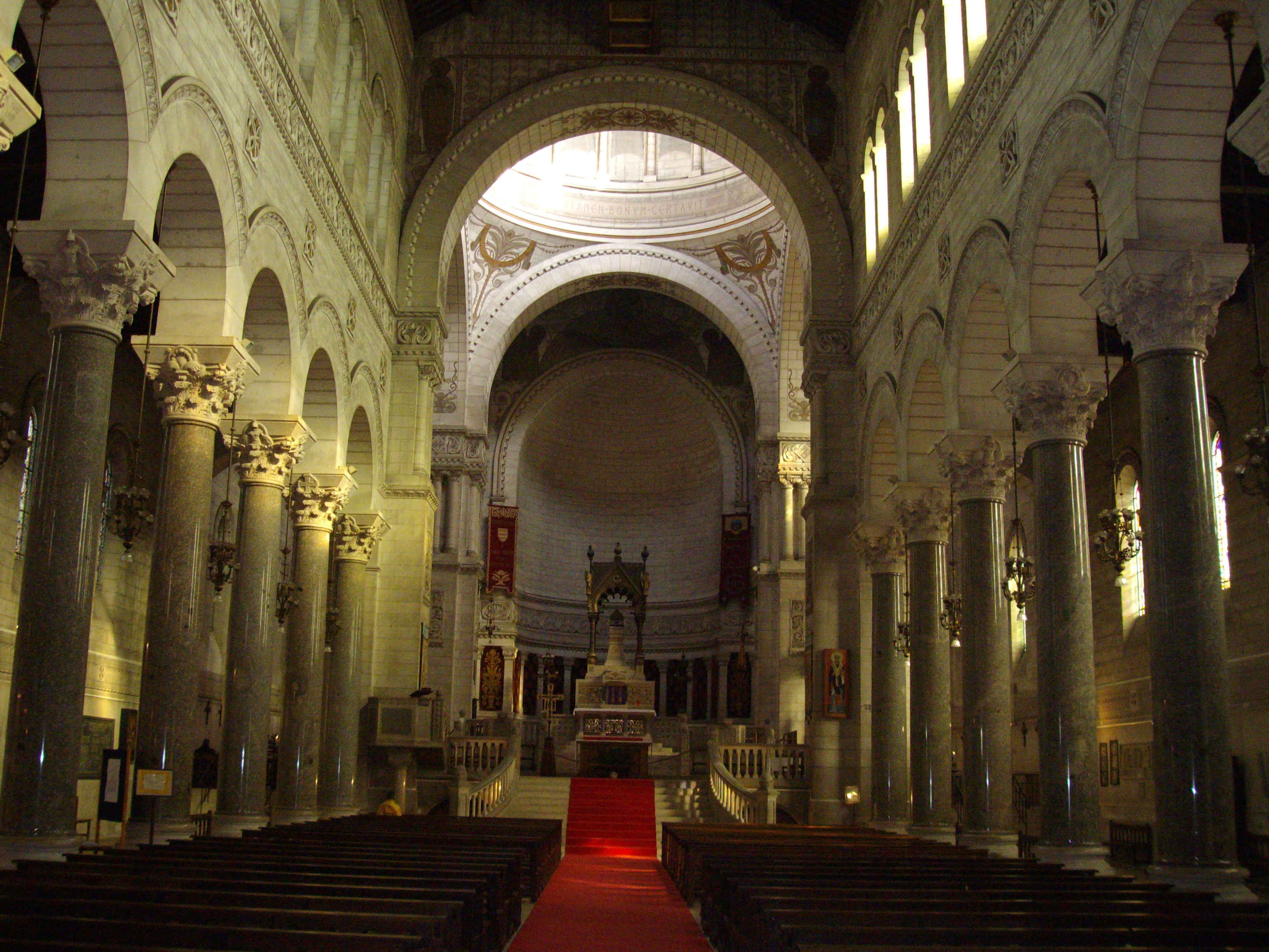 La Basilique Saint Martin de Tours